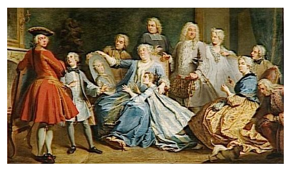 Marie-Madeleine Mercier (1683-1750), nourrice du futur Louis XV roi de France et de Navarre (1710-1774), entourée de sa famille, 1731.